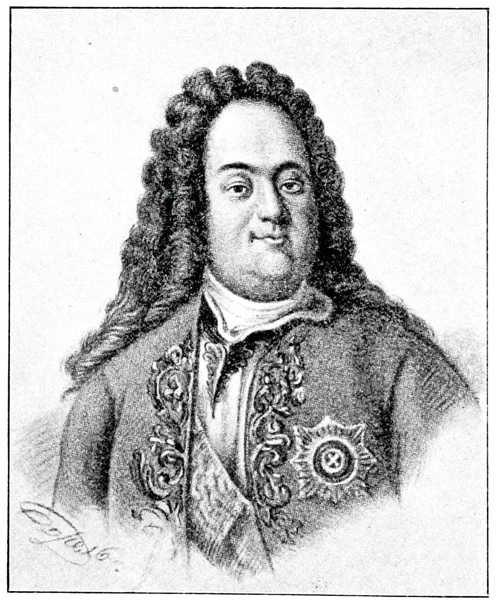 Это изо было использовано в статье «Головин, Федор Алексеевич, граф» опубликованной в восьмом томе «Военной энциклопедии», который был издан книгоиздательским товариществом И. Д. Сытина в 1912 году в столице Российской империи городе Санкт-Петербурге.